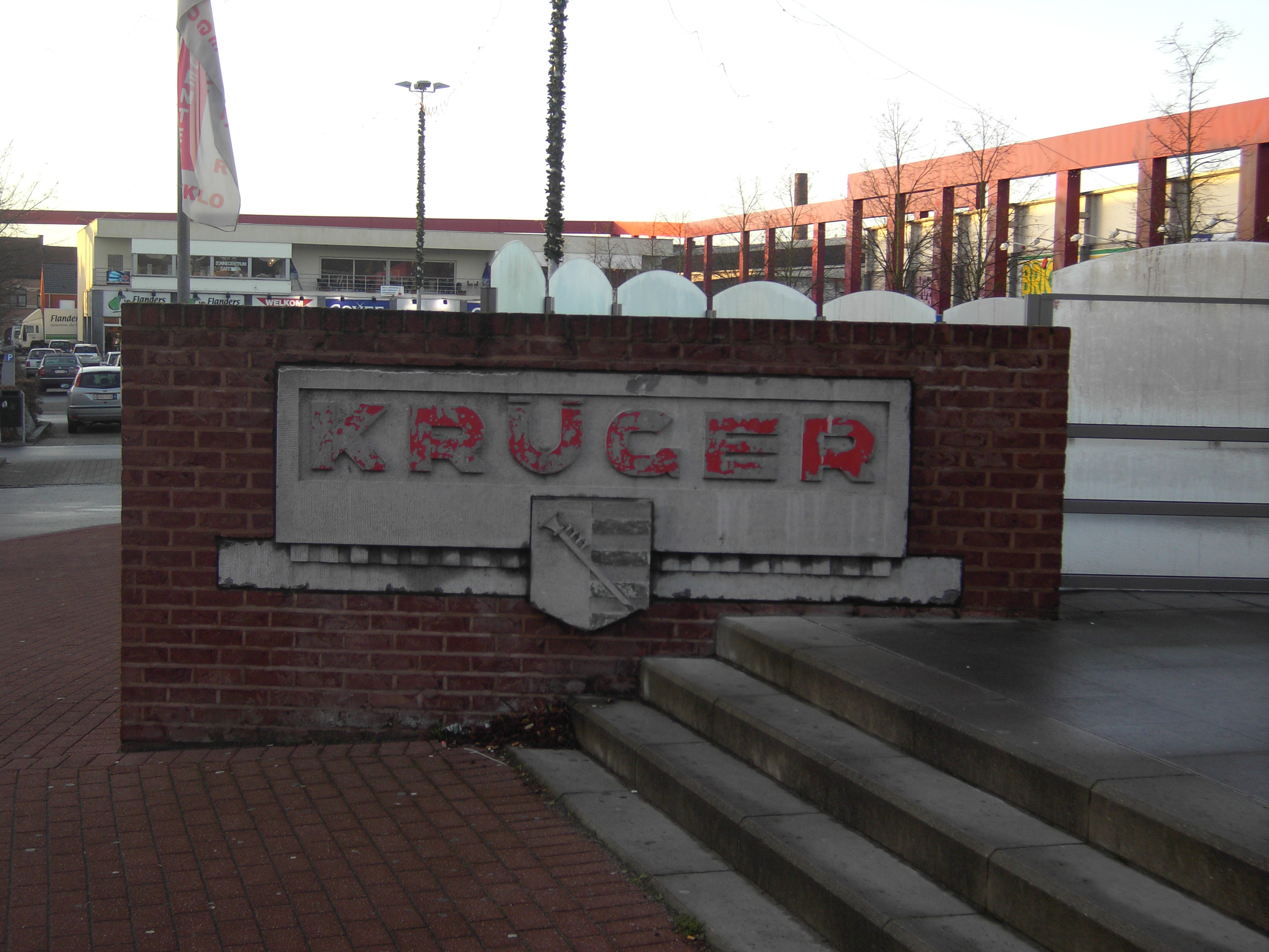 Oud uithangbord van Brouwerij Krüger - Stationsstraat - Eeklo - Oost-Vlaanderen - België